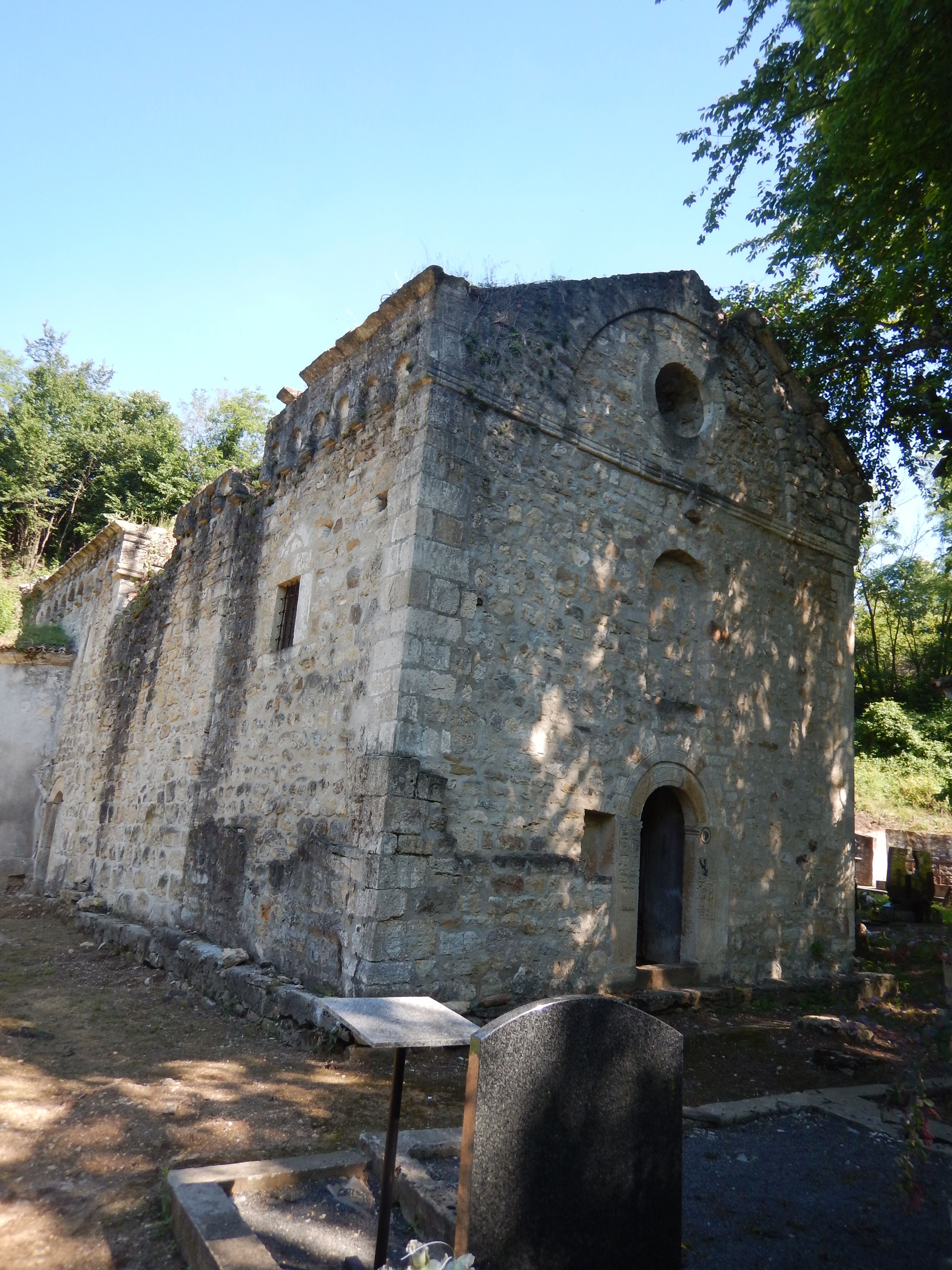 Српски (ћирилица): Црква Преображења Христовог у Горовичу је непокретно културно добро - споменик културе од 19.03.1969.